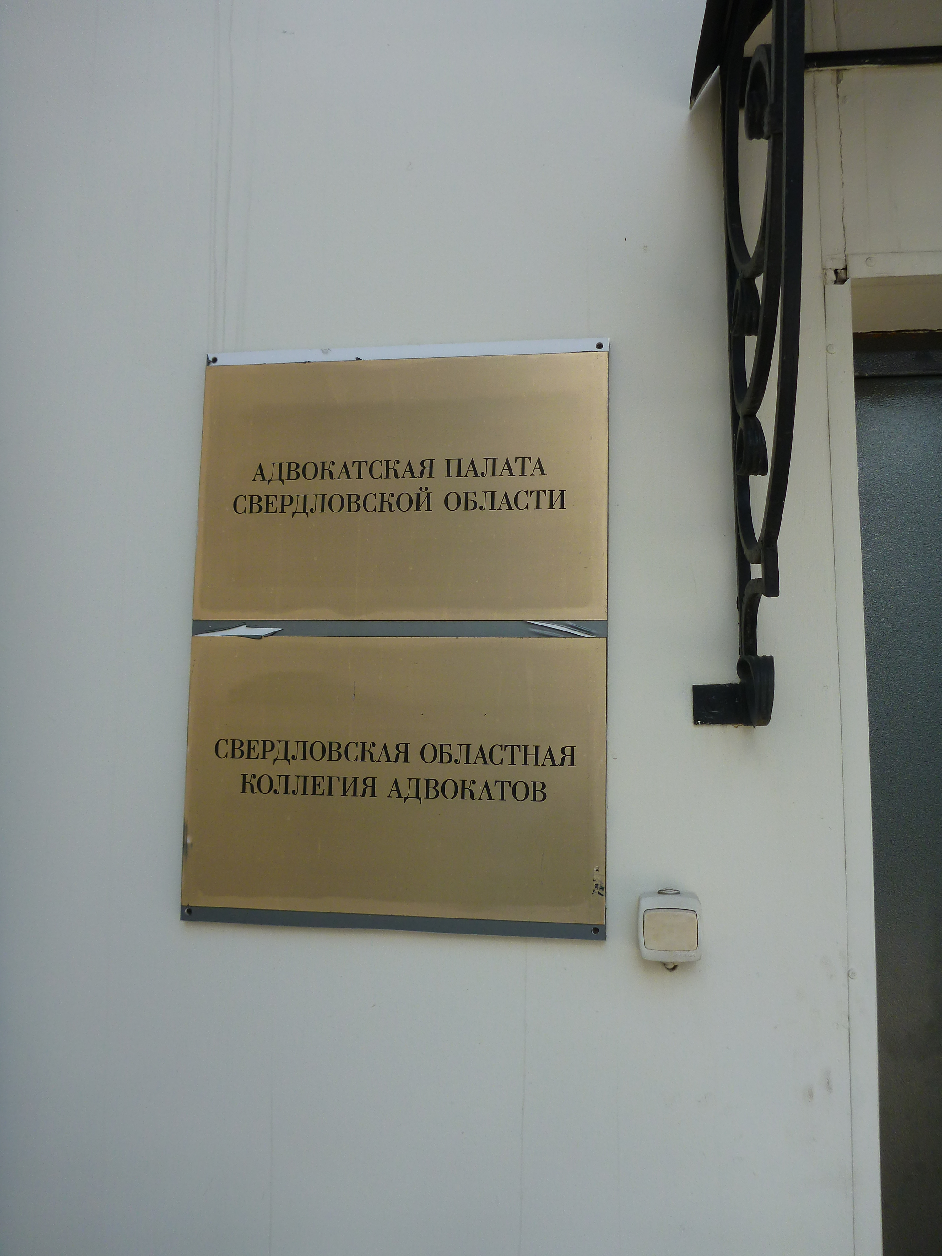 Адвокатская палата Свердловской области вход 29 января 2020 года